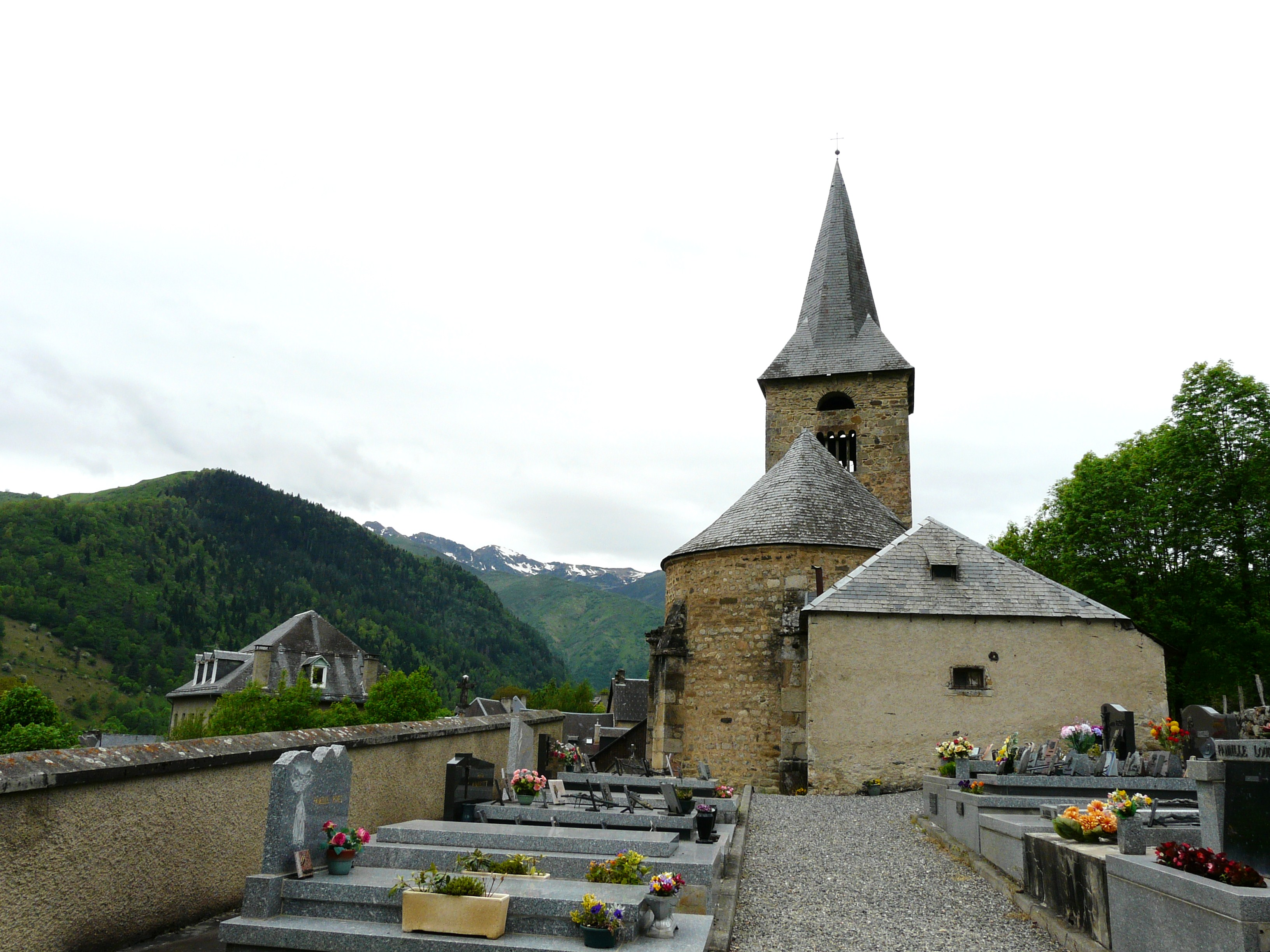 L'église Sainte-Anne de Cazeaux-de-Larboust, Haute-Garonne, France.